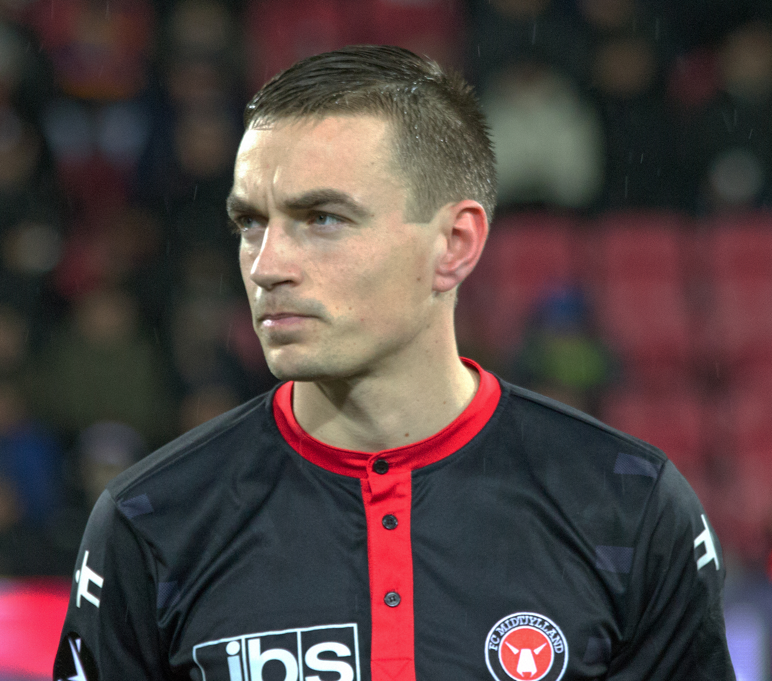 Petter Andersson umiddelbart inden kampen FC Midtjylland-AGF 8. december 2013